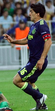 Luis Suárez (futbolista)